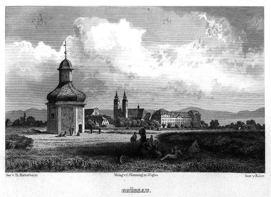 Grüssau